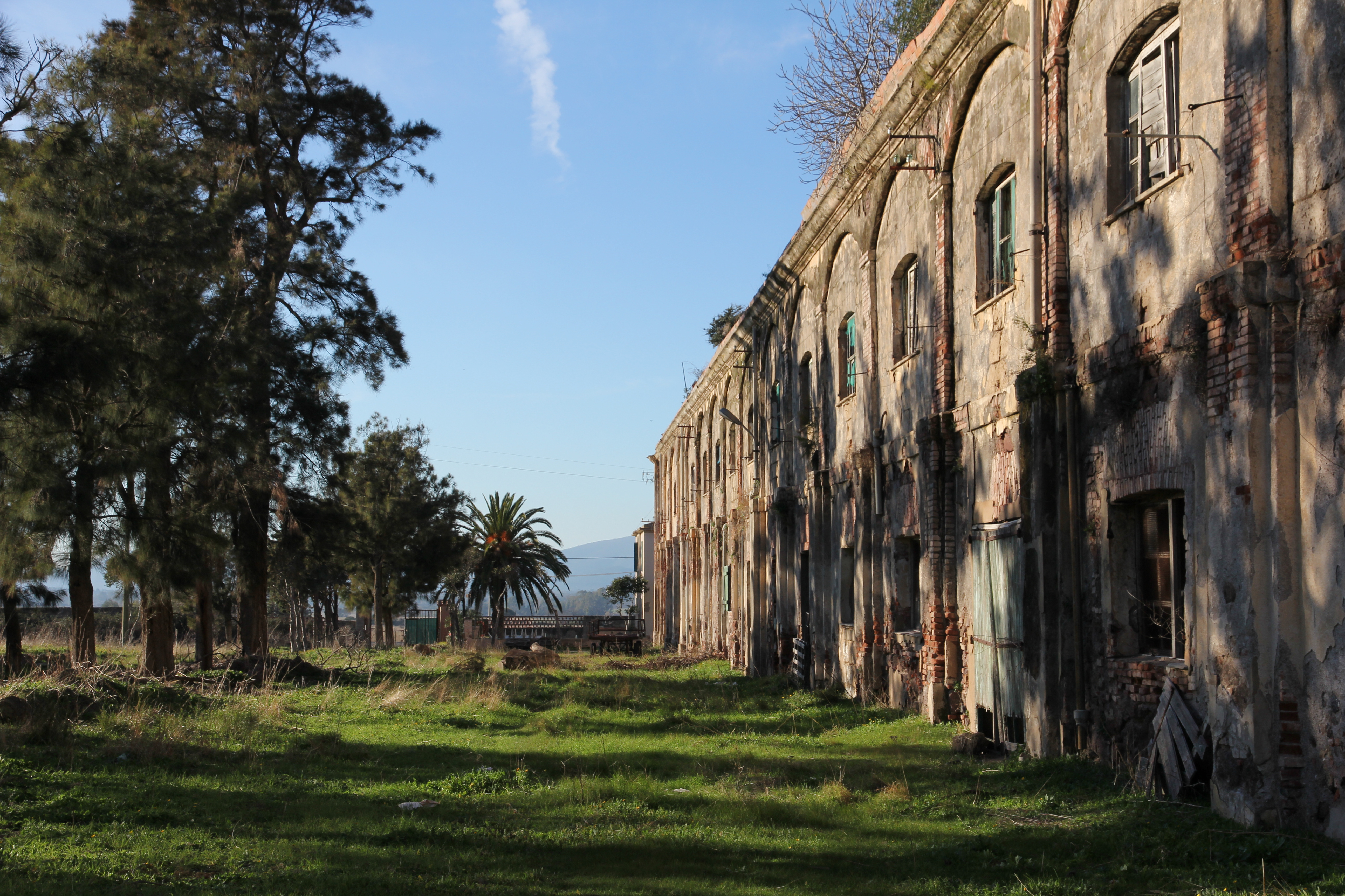 Alghero - Azienda Surigheddu